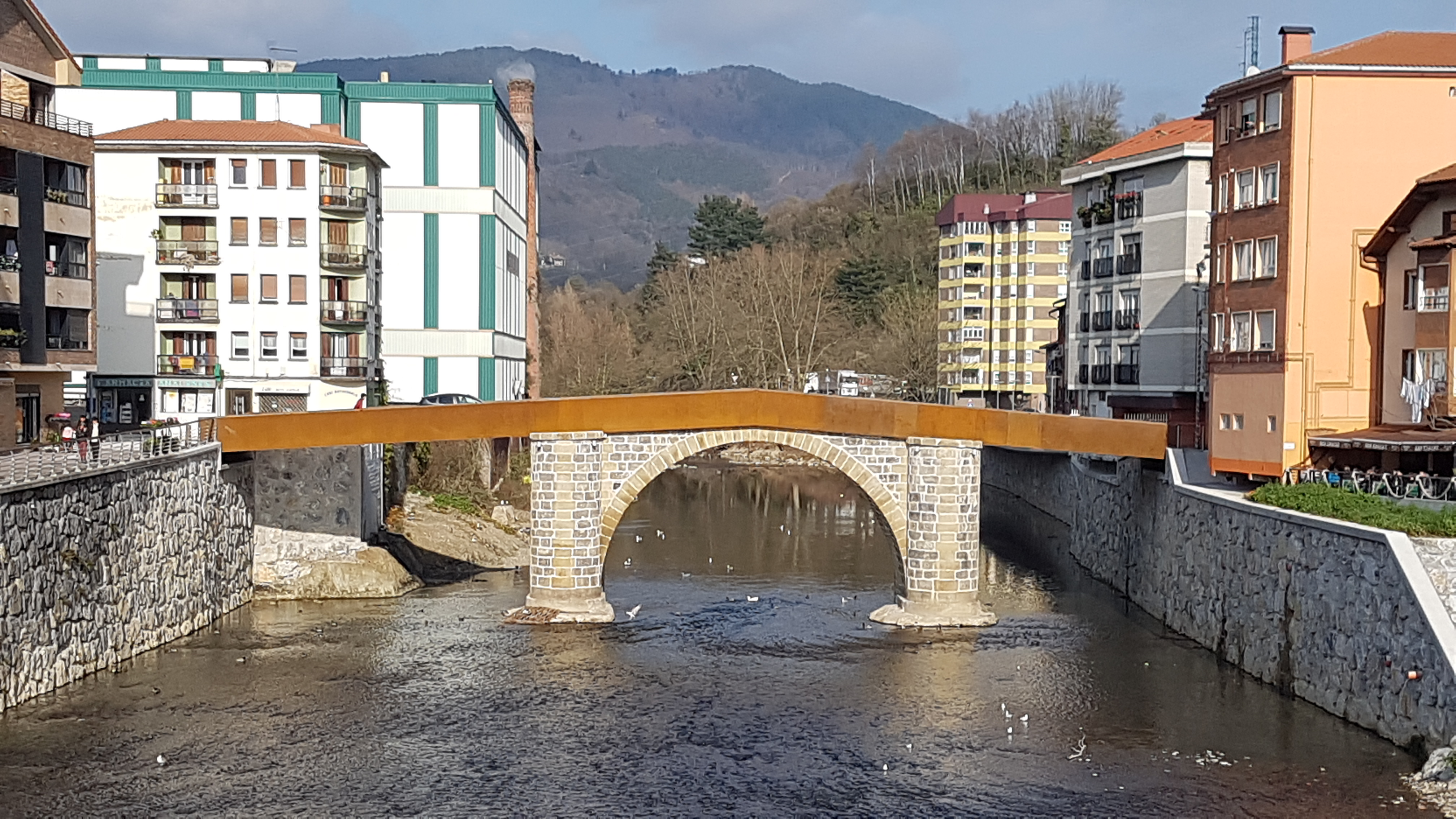 Zubimusu zubi berria